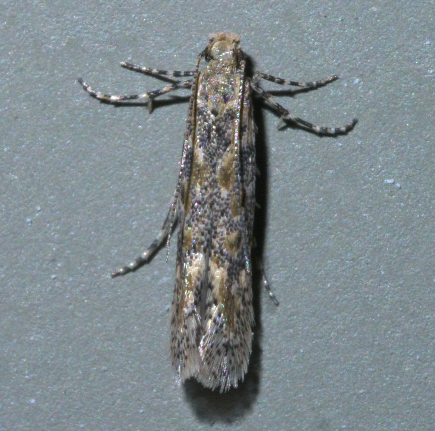 Gnorimoschema triocellella, Hodges #2006, Size: 5.4 mm, ID Confidence: 98